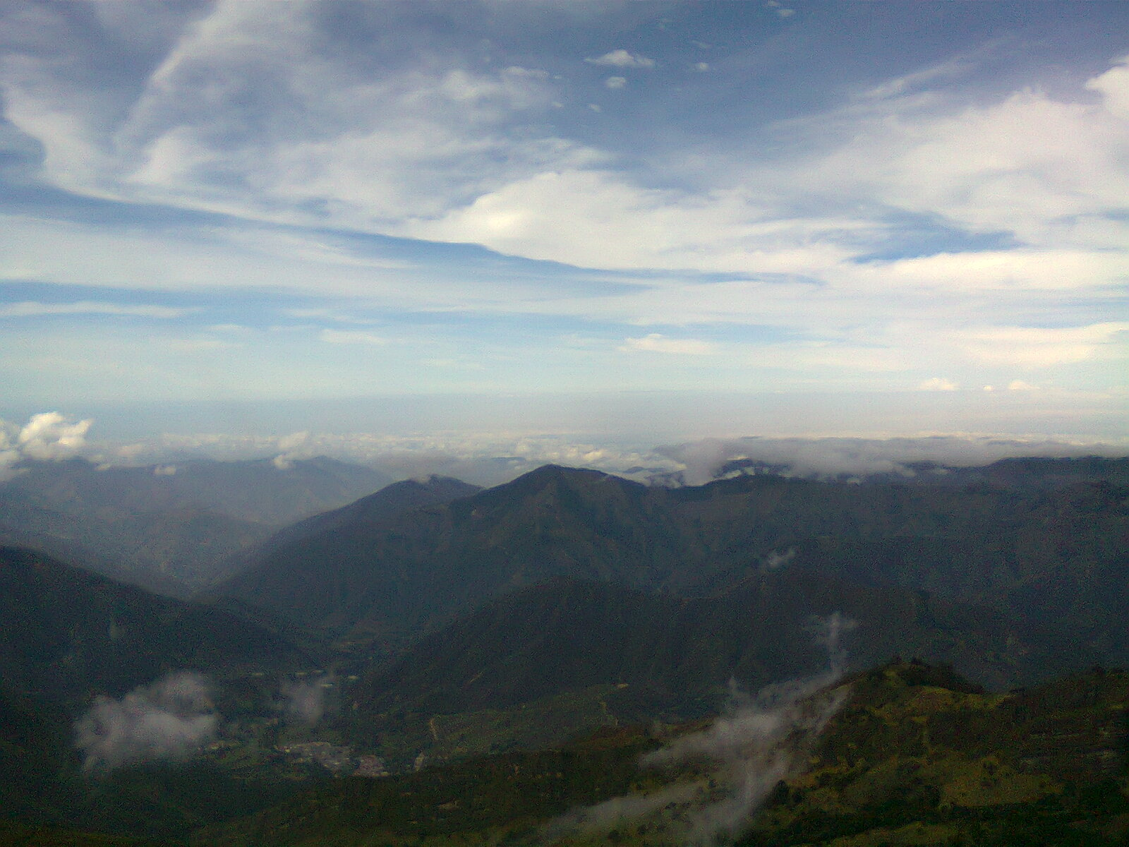 Espectacular vista de las verdes montañas y azul cielo de los Andes colombianos en Cachira Norte de Santander Esta fotografía fue tomada en el municipio colombiano con código 54128.